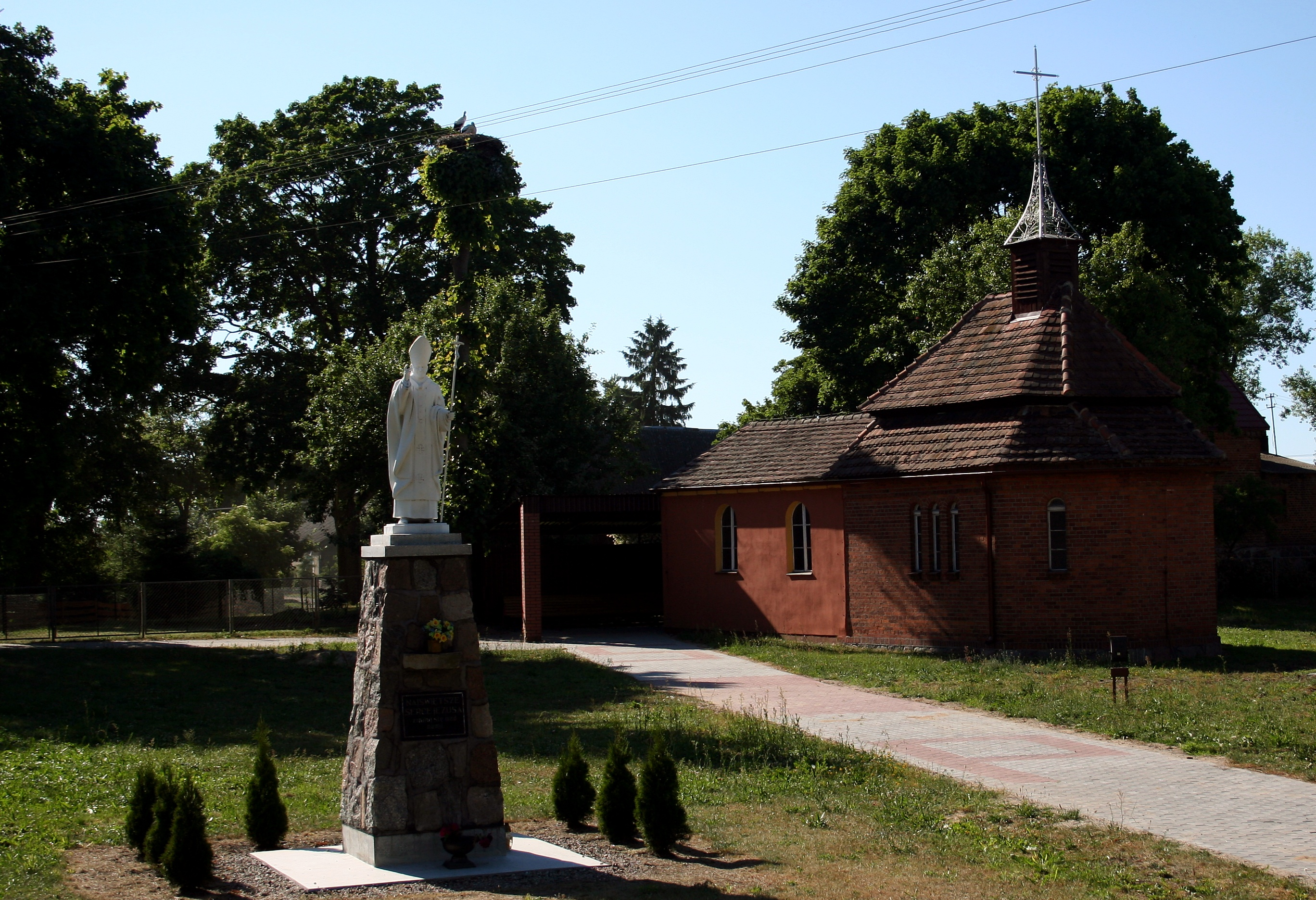 Figura JP II i kaplica w Mokrem, gmina Czersk